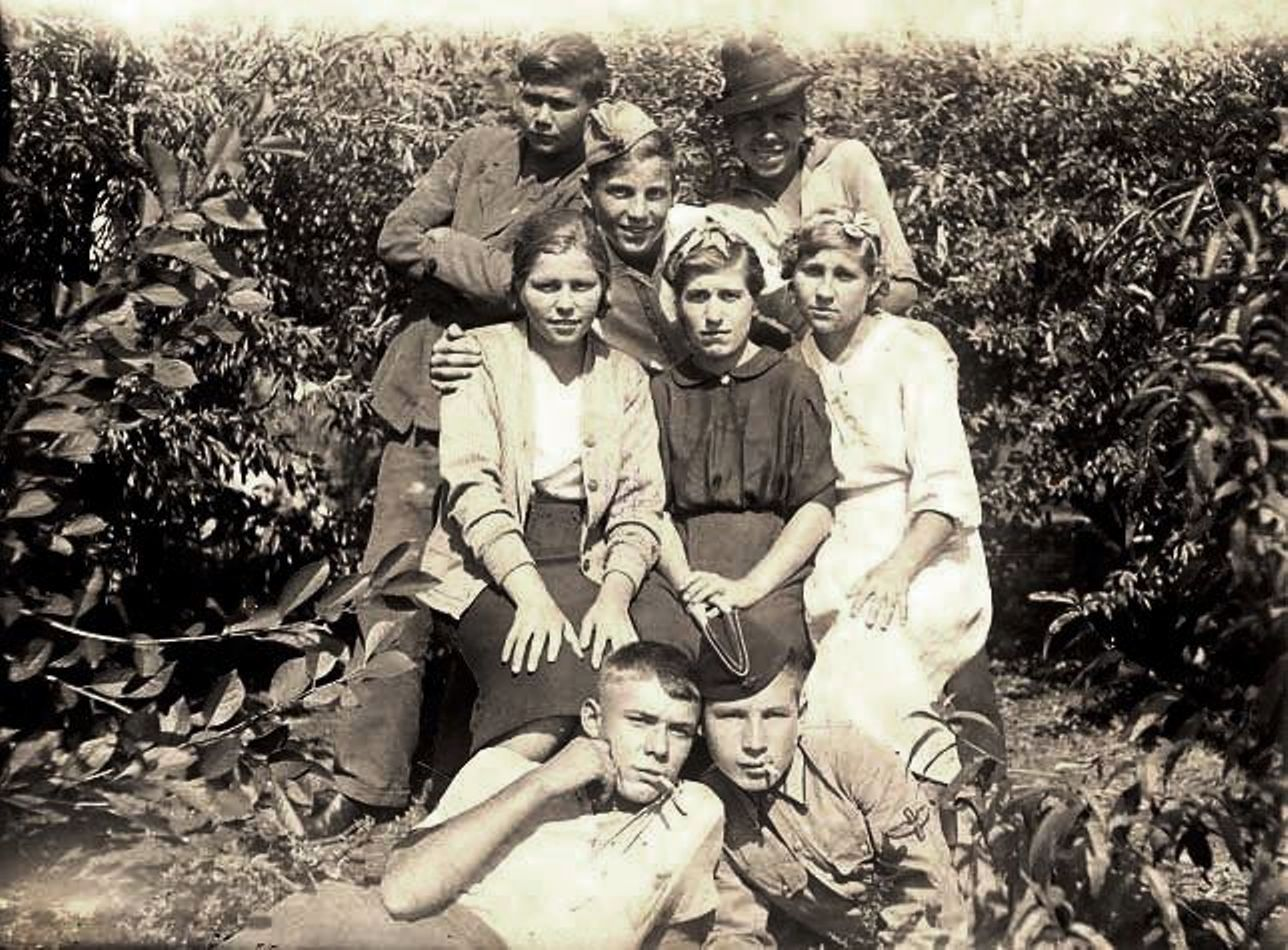 Люба Шевцова (в среднем ряду первая слева) перед отъездом в школу радистов. Март 1942 г.